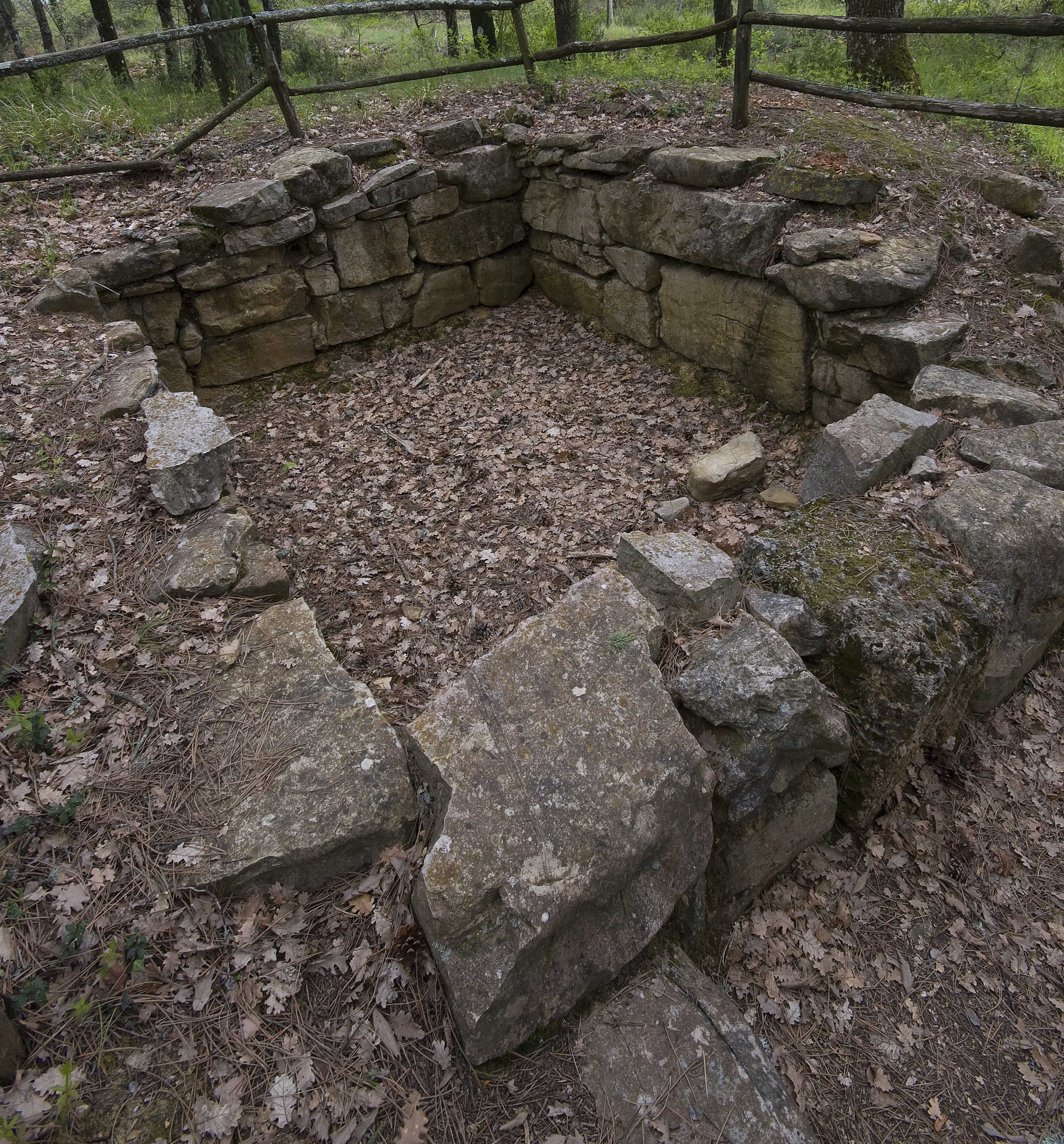 Necropoli del Poggino tomba 4